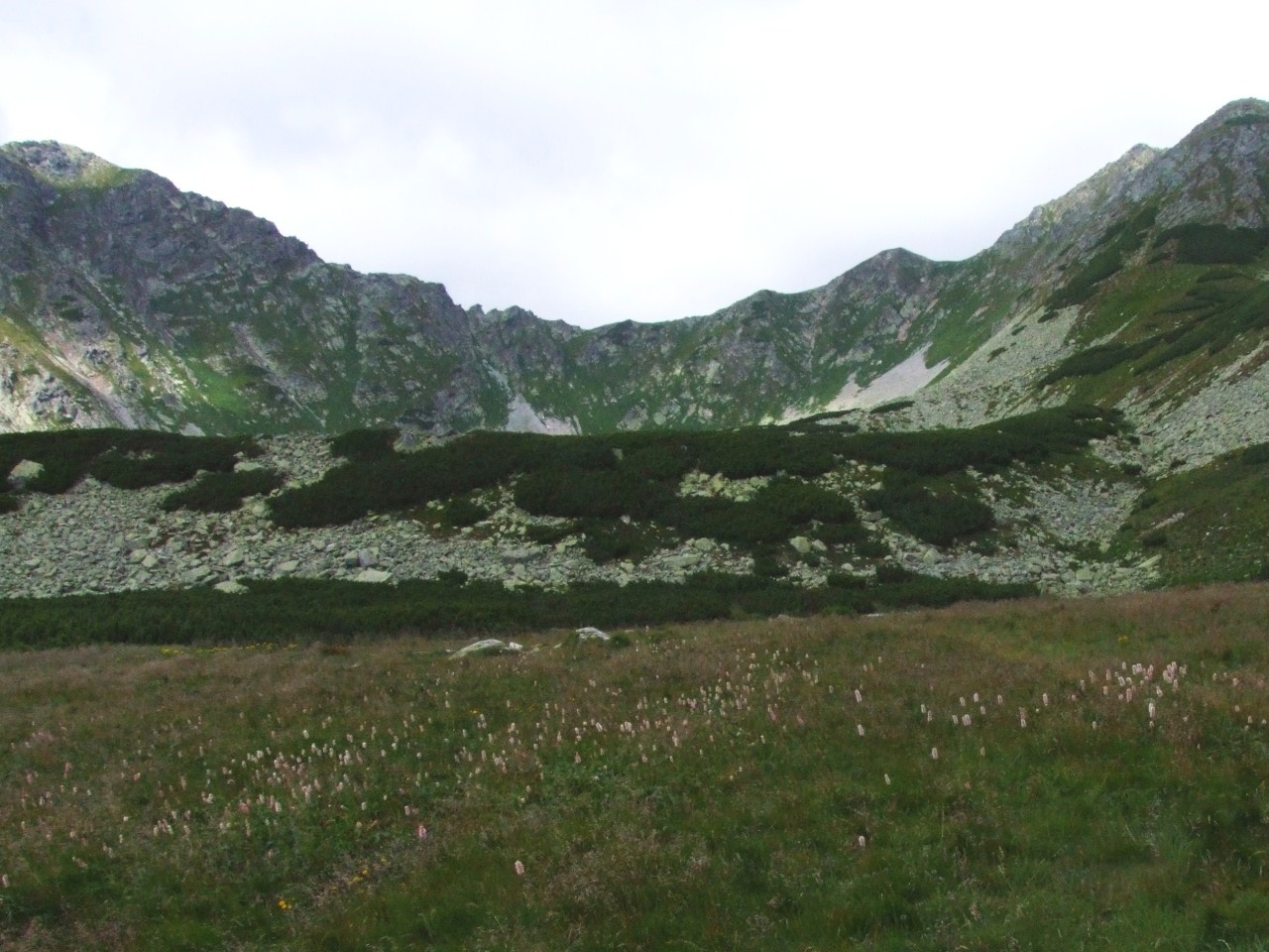 Dolina Bystra (Tatry Zachodnie)